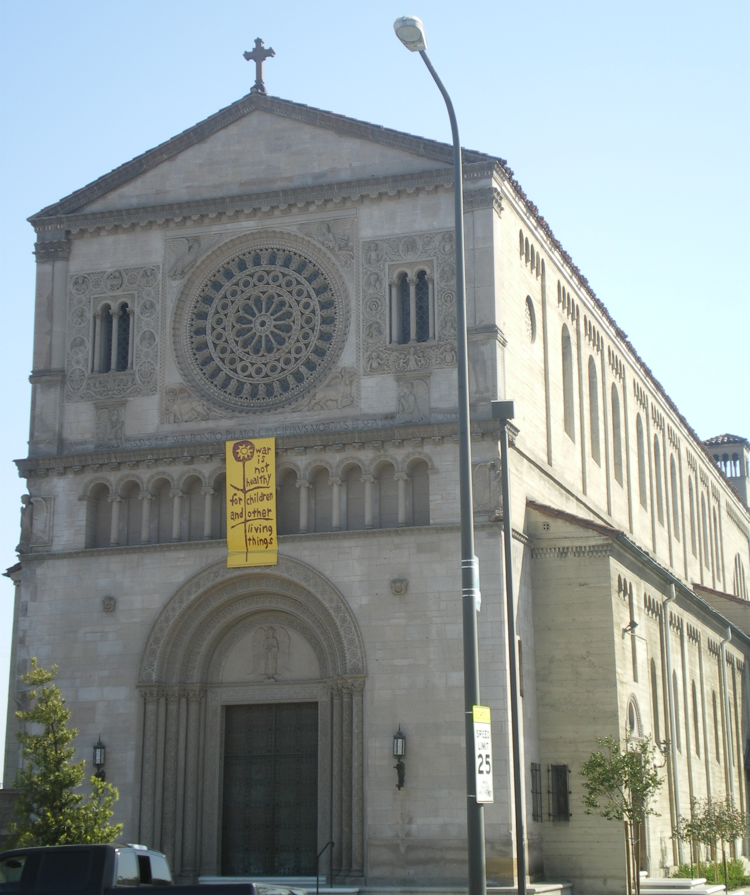 514 W. Adams Blvd